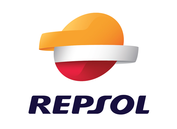 Logo de la petrolera española Repsol